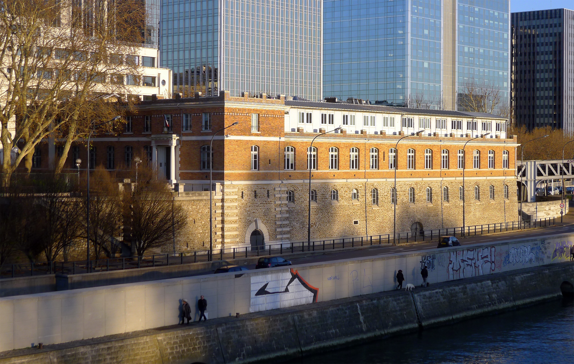 Institut médico-légal de Paris - Paris XII